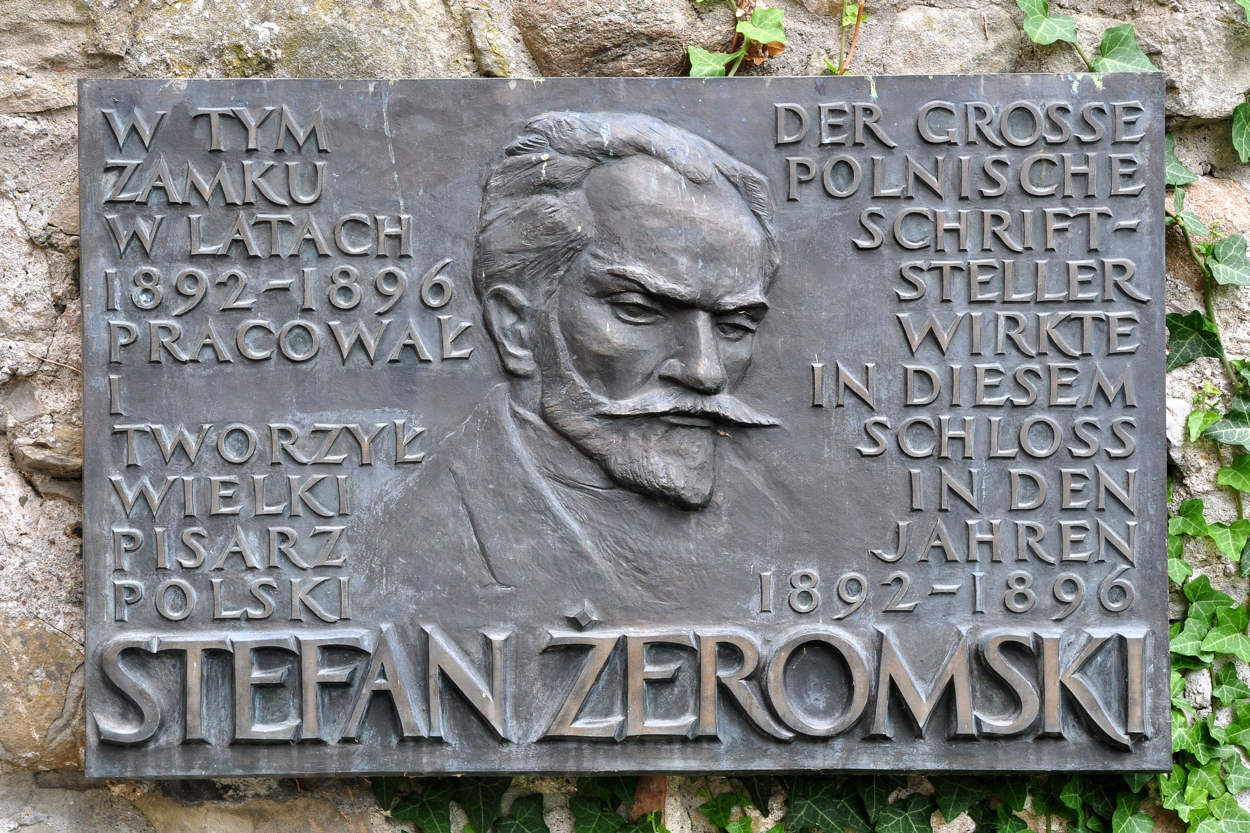 Stefan Żeromski, Kräutergarten und Polnisches Gartendenkmal (herbal garden and Polish garden memorial) at 'the' Schloss (castle) in Rapperswil (Switzerland)